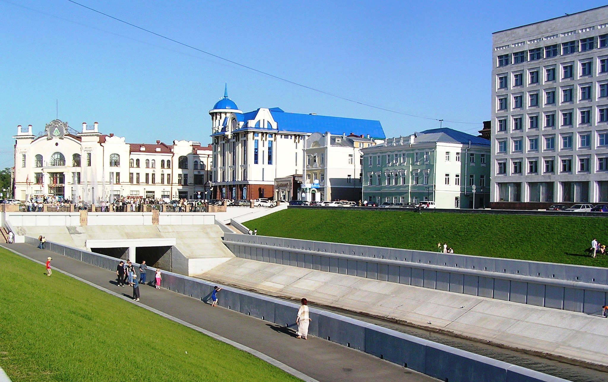 Набережная реки Ушайка город Томск